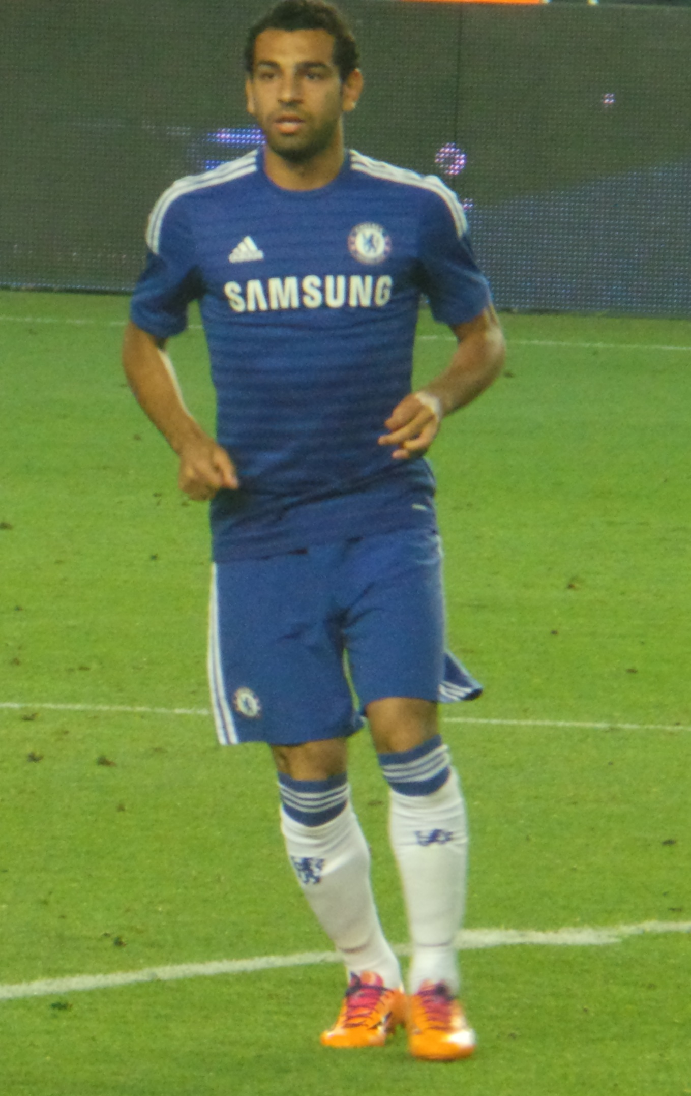 Mohamed Salah